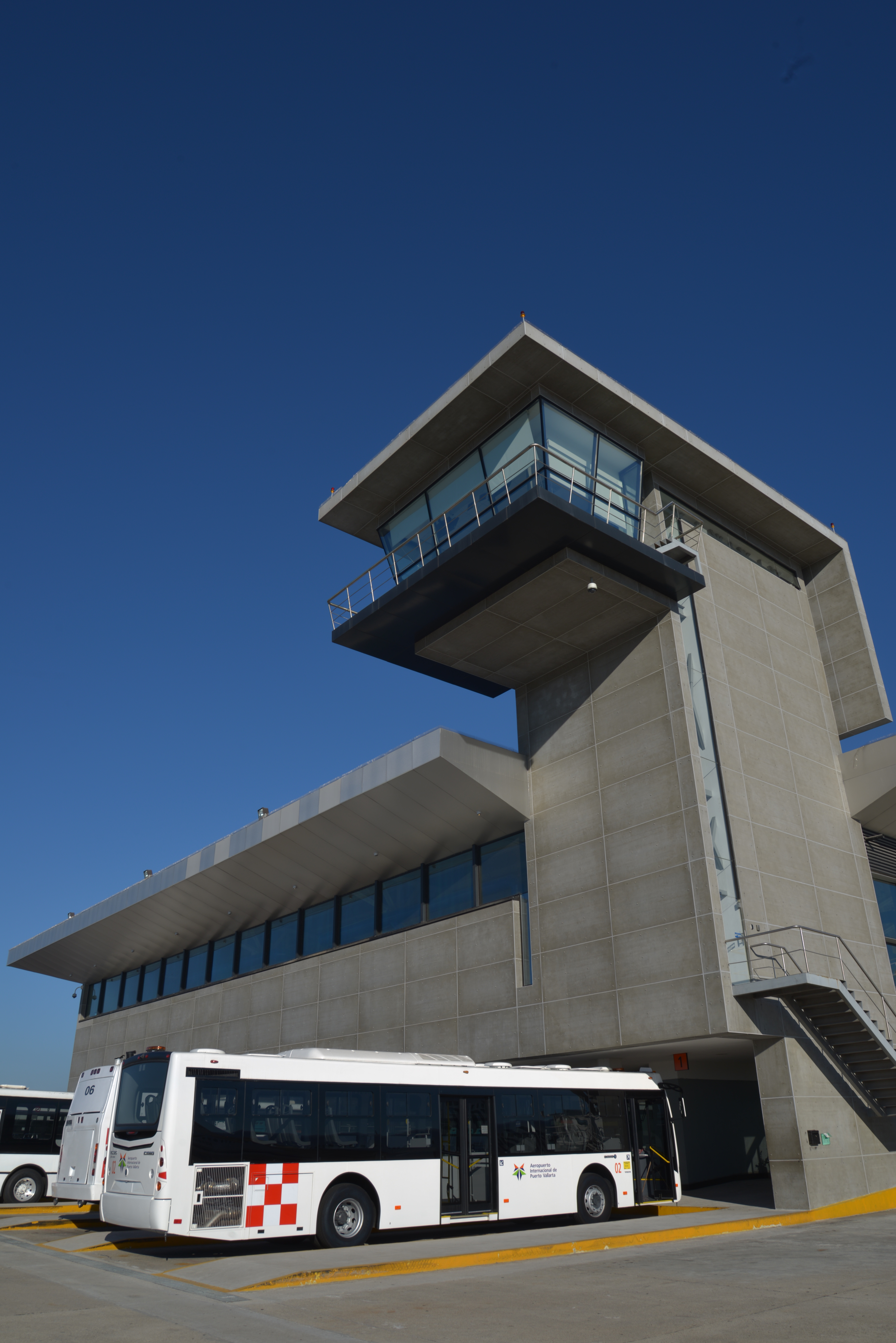 aeropuerto